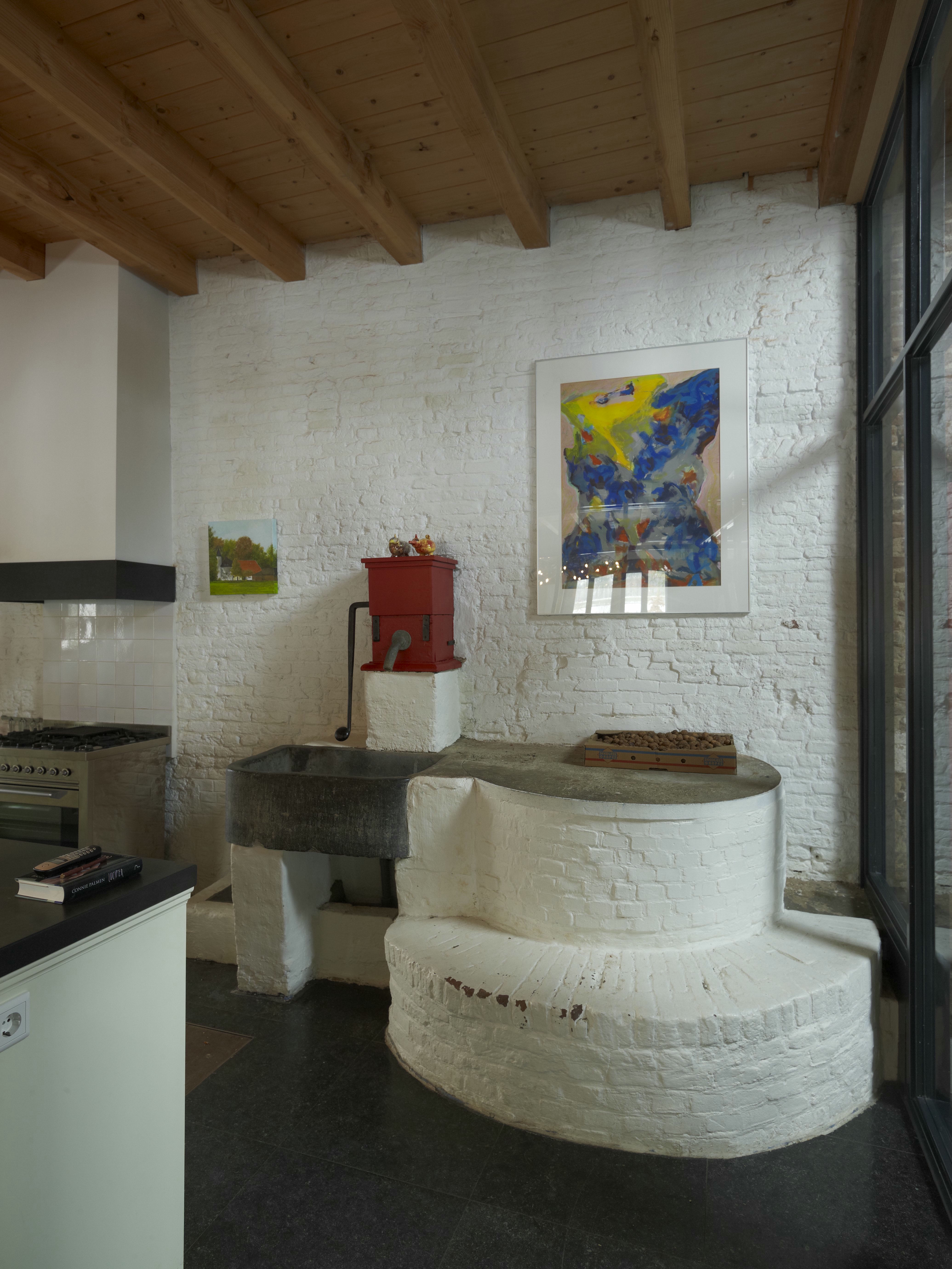 Herbestemming/ Boerderijen: Interieur waterput met pomp in keuken, (opmerking: Herbestemming boerderijen)